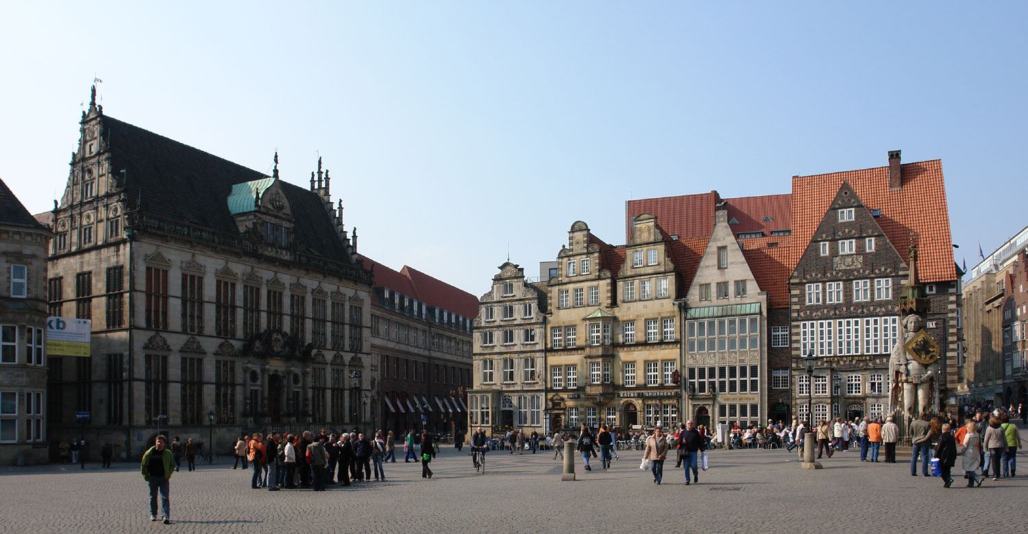 Bremer Marktplatz: Schütting und Giebelhäuser an der Nordwestseite Die Gesamtanlage „Bremer Marktplatz“ ist ein geschütztes Kulturdenkmal in der Freien Hansestadt Bremen, mit der Nr. 0065 beim Landesamt für Denkmalpflege registriert.